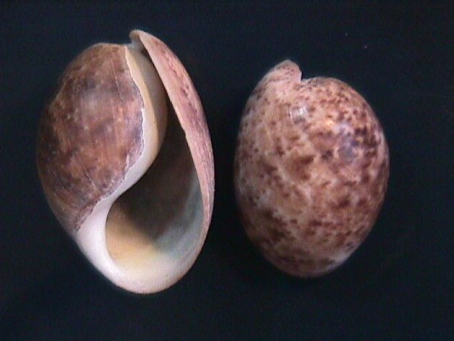 Bulla amygdala del Estado Vargas